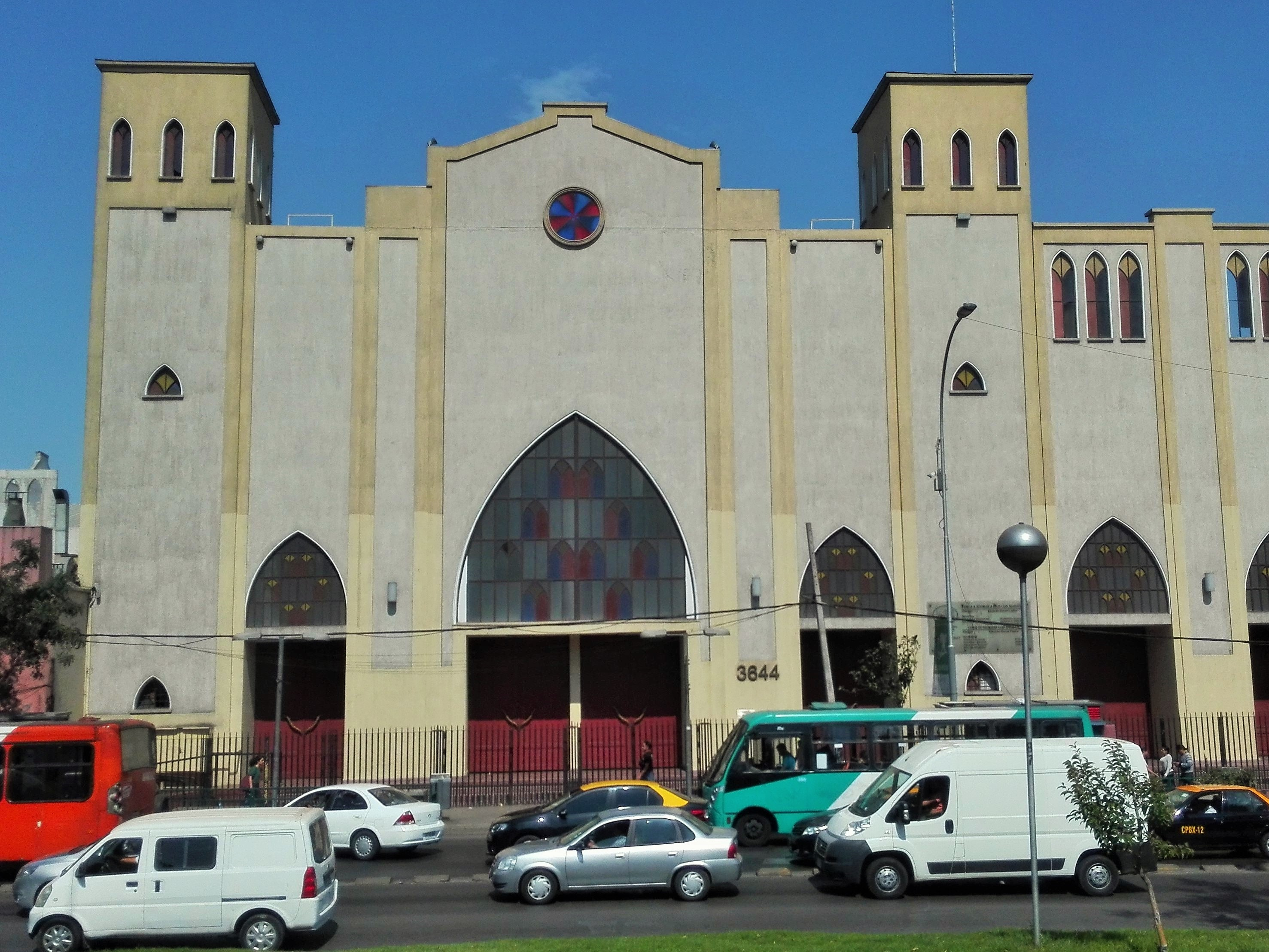 Frontis Catedral Evangélica de Chile.